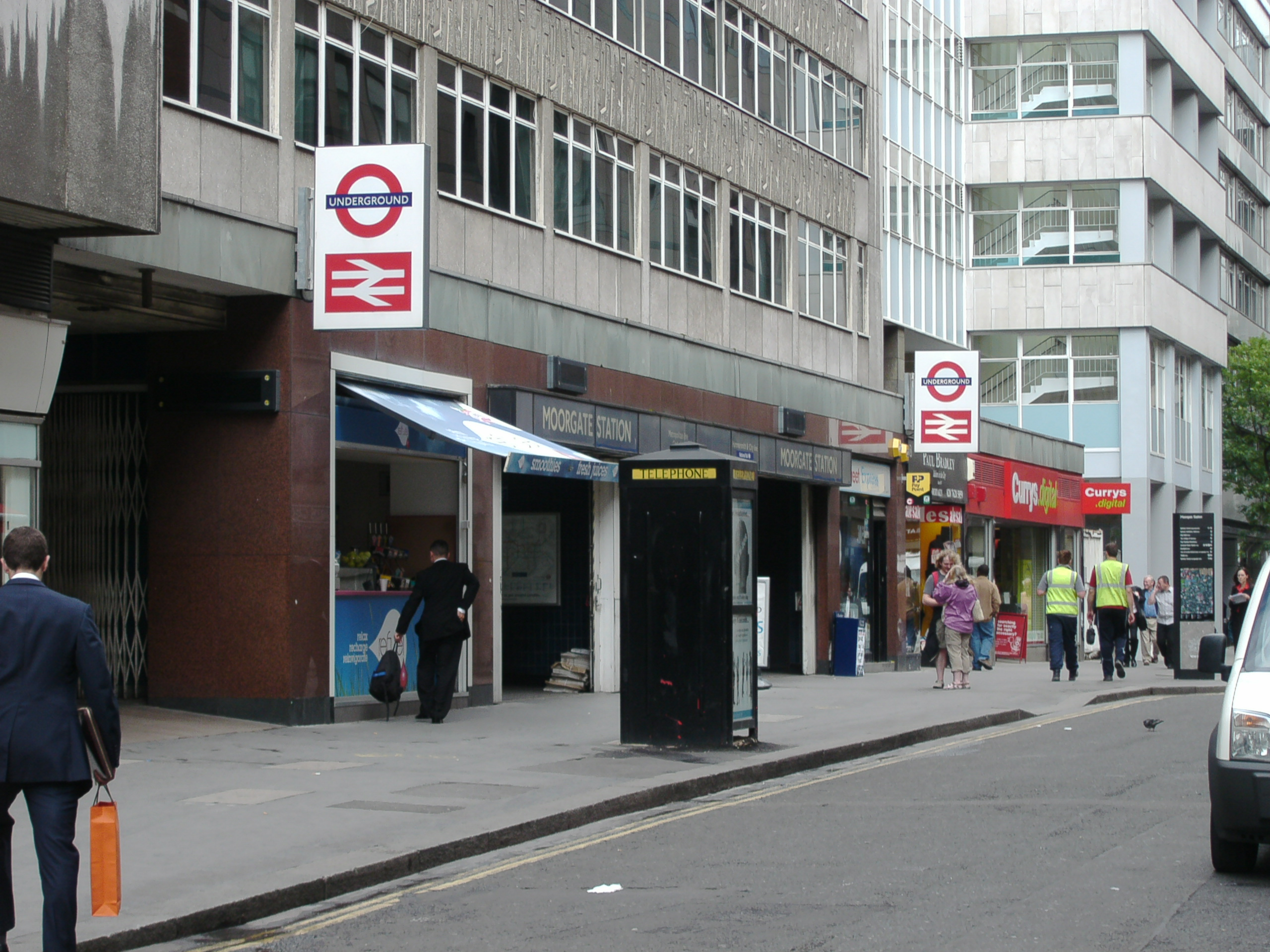 Bahnhof Moorgate - Ostseite